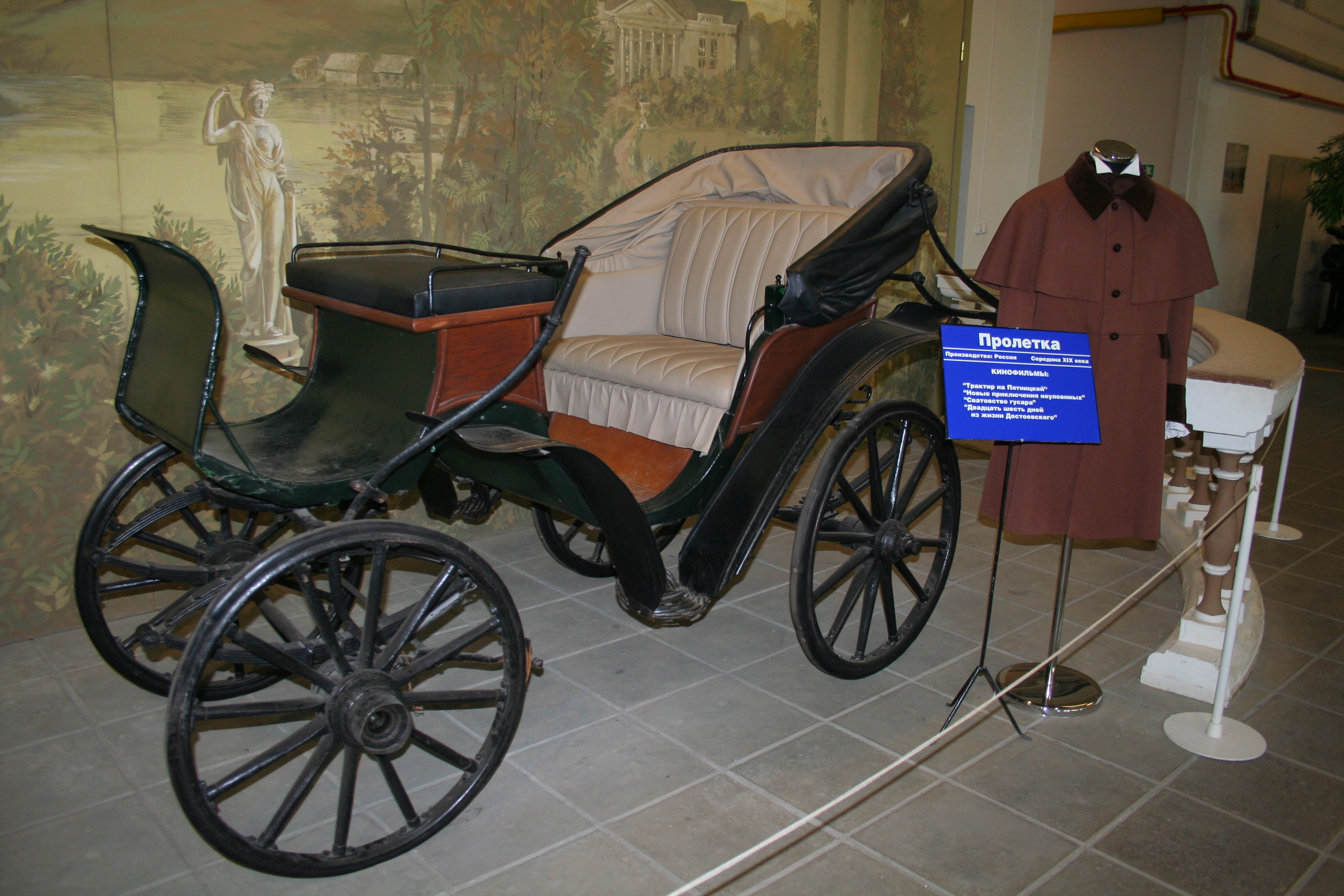 Museum auf dem Gelände des Filmstudios Mosfilm in Moskau. Die Exposition. Eine Kutsche, Mitte des 19. Jh.